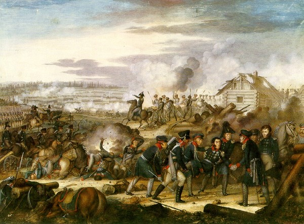 Худ. Жан Герен. Ранение П. И. Багратиона в Бородинском бою. 1816